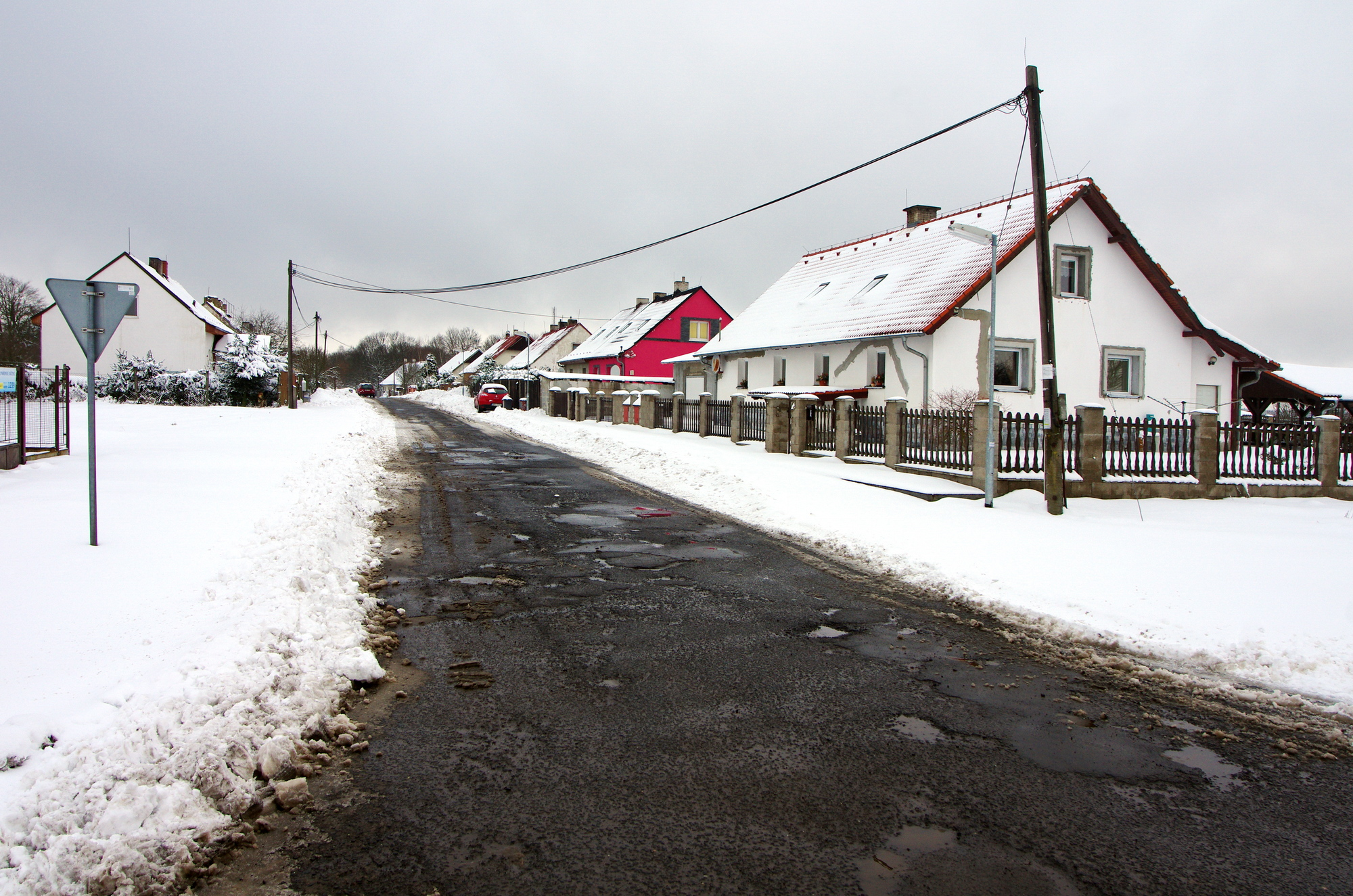 Květná u Krajkové, okres Sokolov